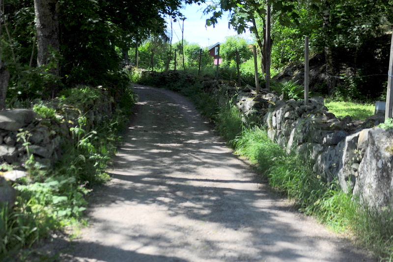 En av byvägarna i Rolstorps by, Raskens väg, som leder upp till den gamla byabrunnen